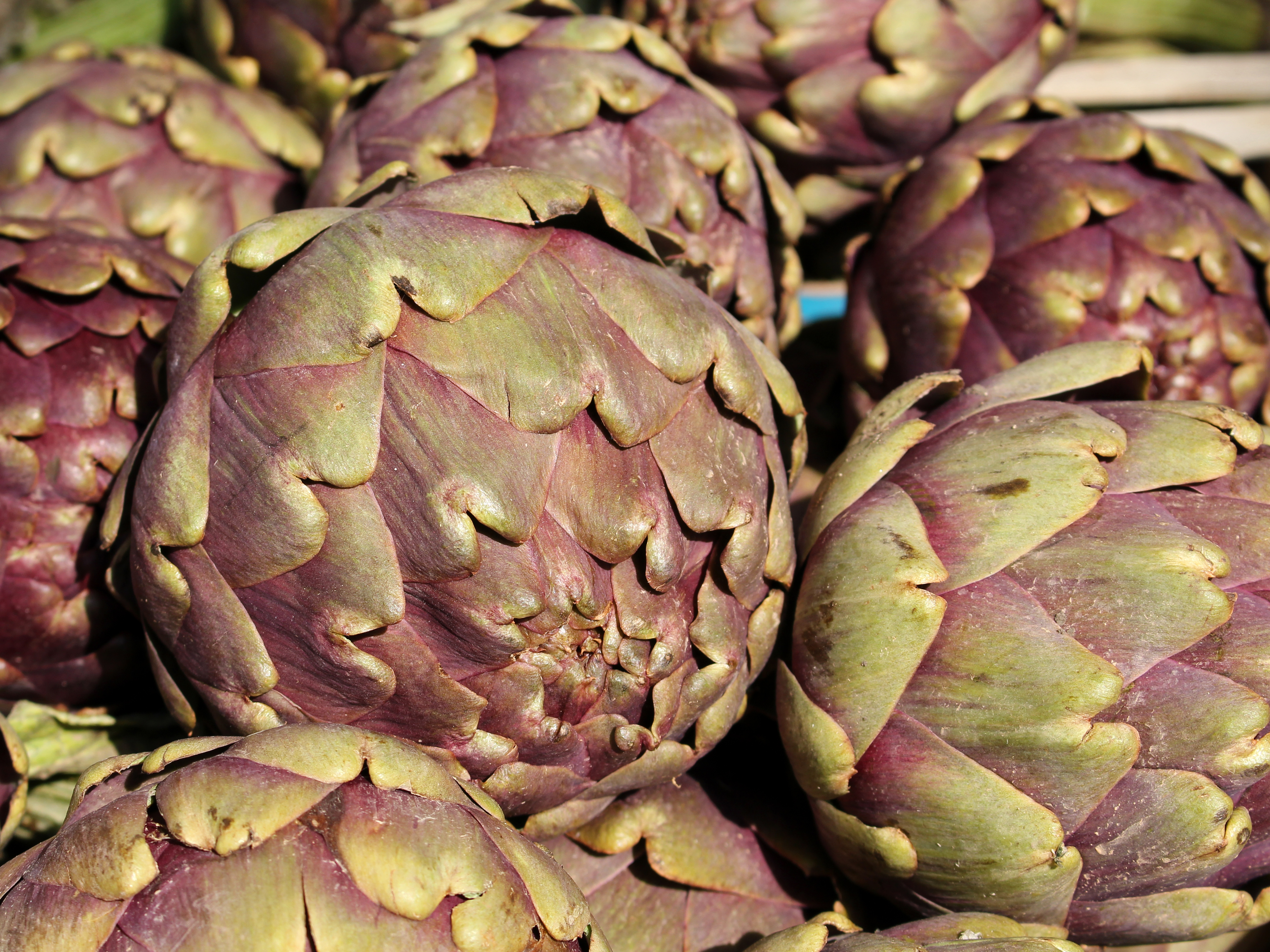 Artischocken in Wien-Hietzing